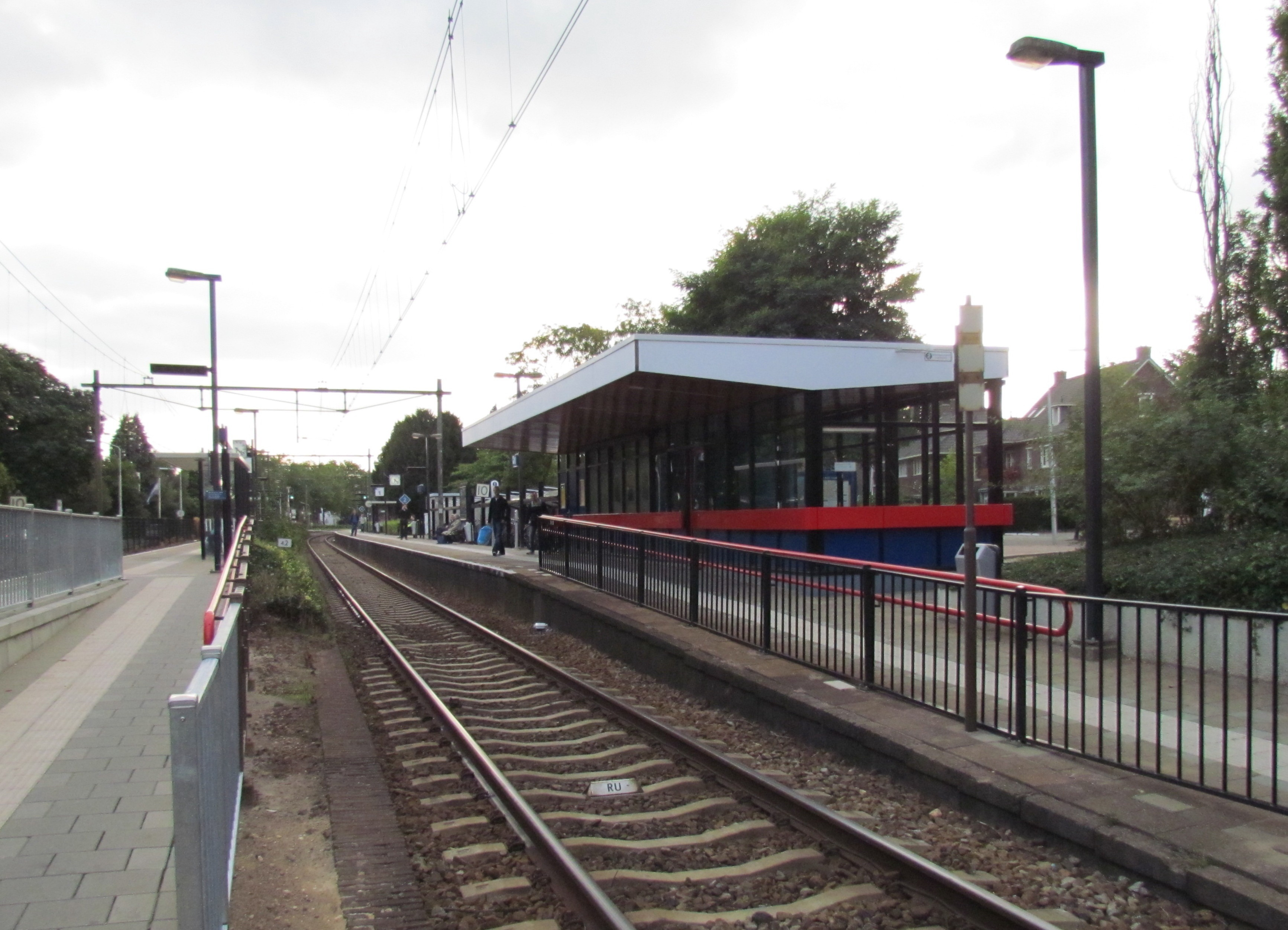 Station Velp (NL)